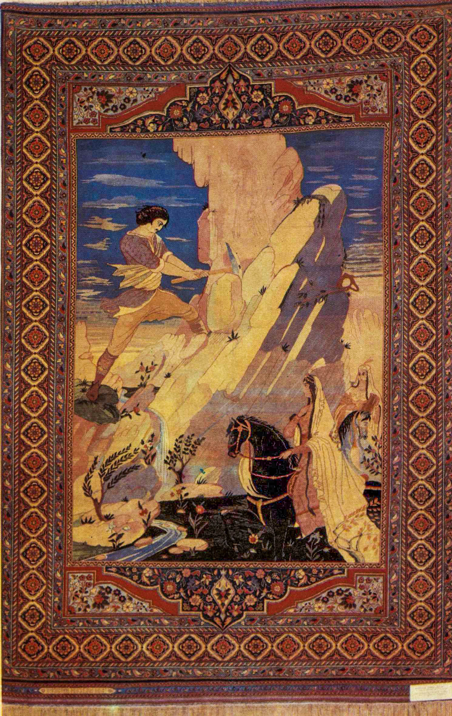 Şirinin Fərhadı ziyarət etməsi, Lətif Kərimov və Qəzənfər Xalıqov, 1939, Azərbaycan Ədəbiyyat Muzeyi